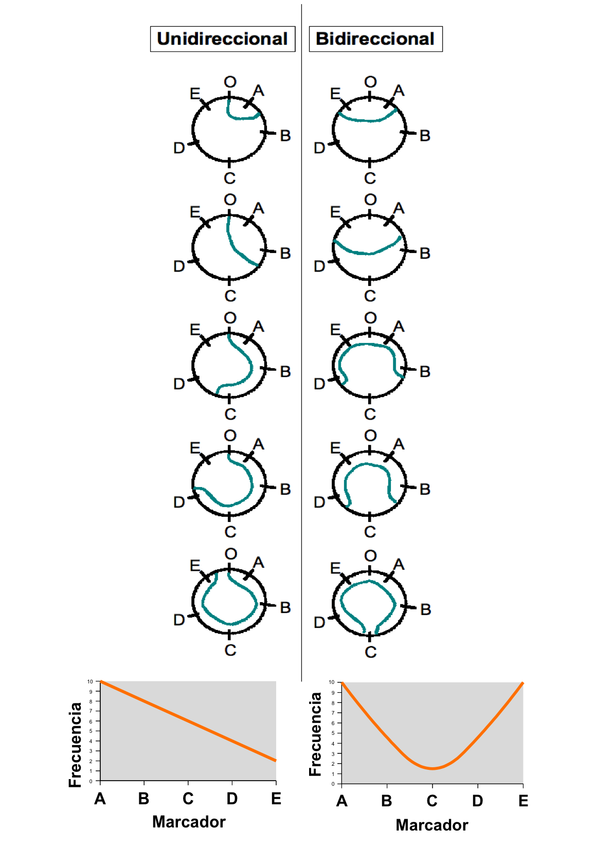 diferenciación replicación unidireccional/bidireccional mediante recuento de marcadores